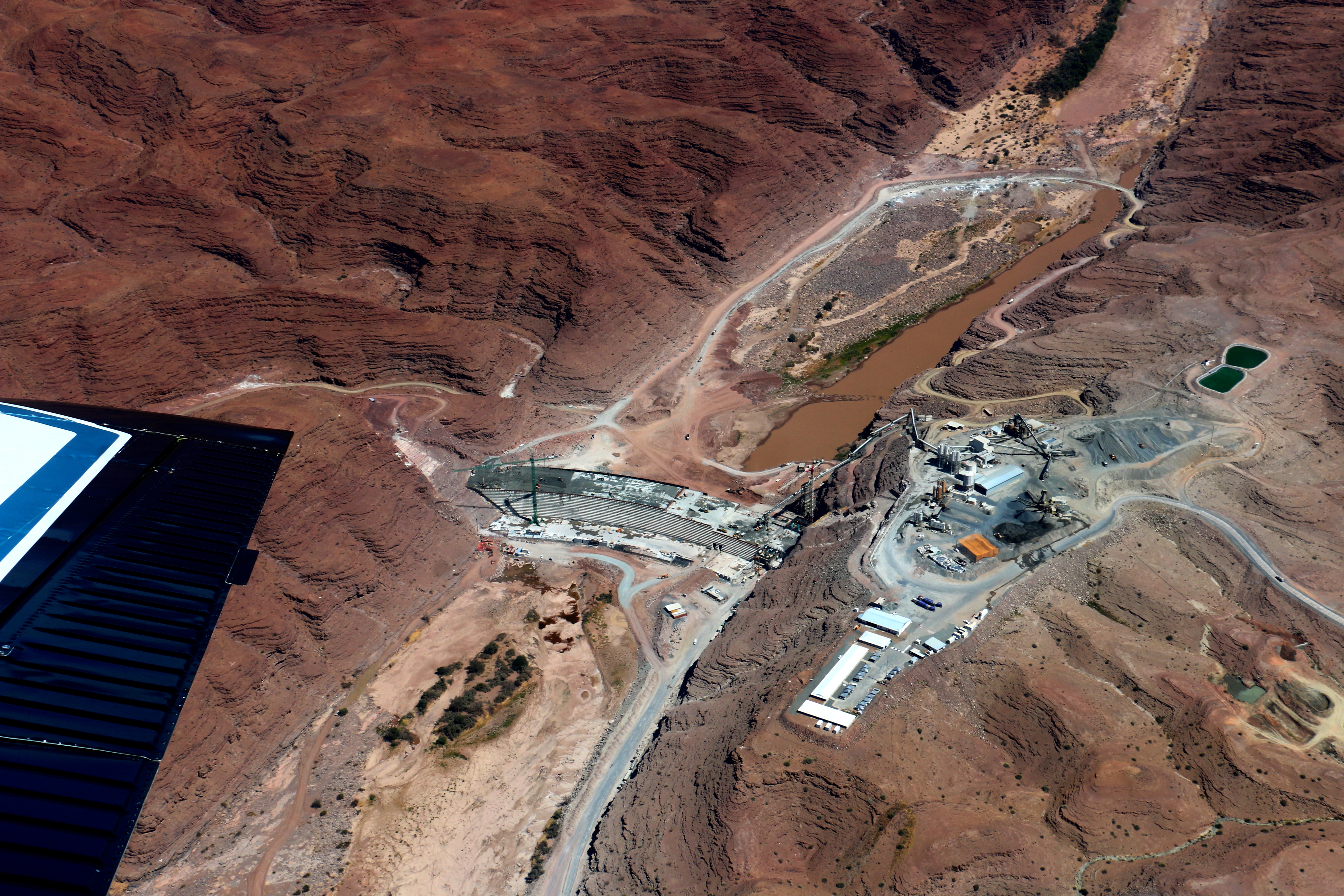 Vogelperspektive des Neckartal-Dammes